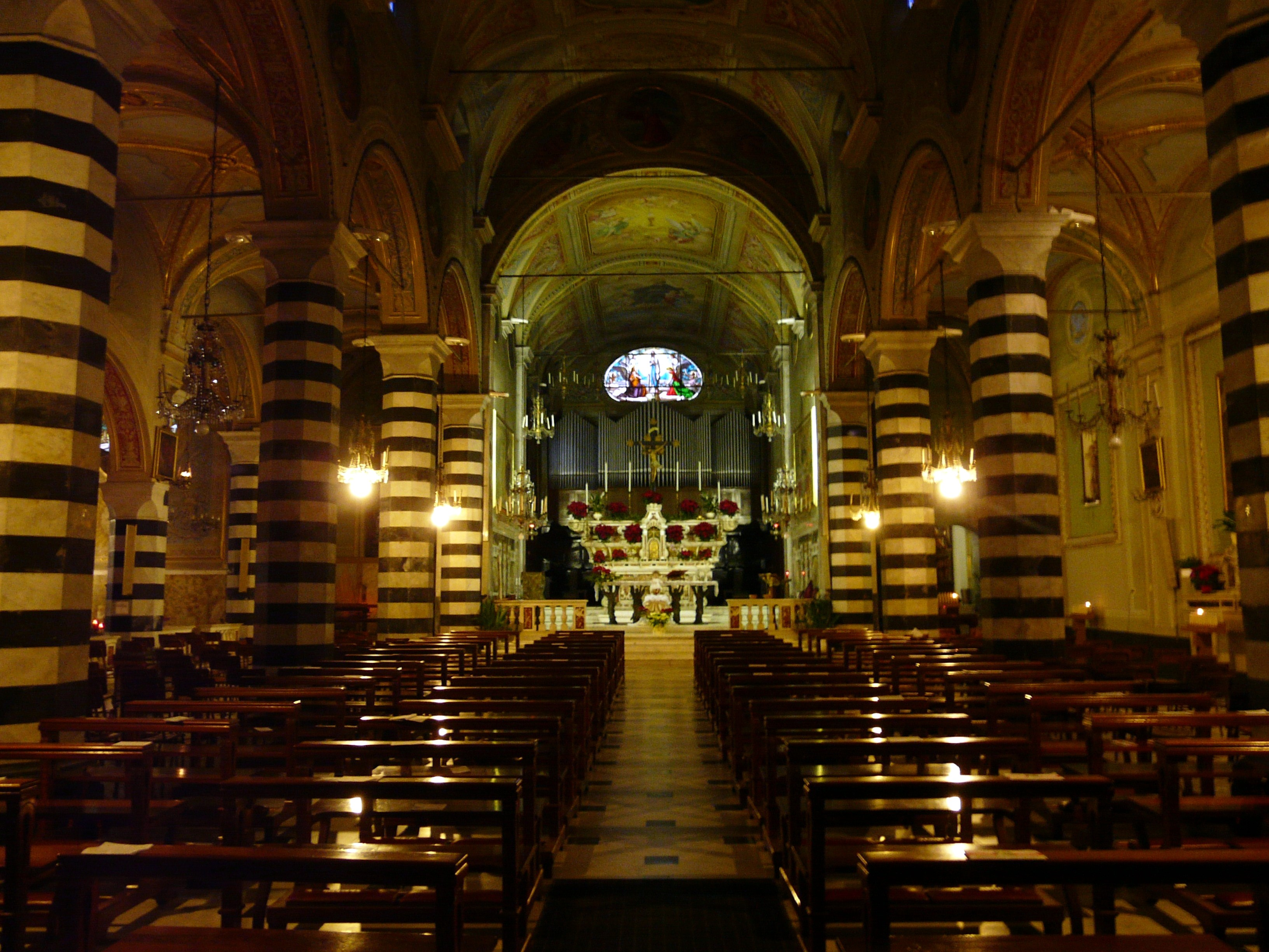 Navata centrale della chiesa di San Francesco d'Assisi, Rapallo, Liguria, Italia